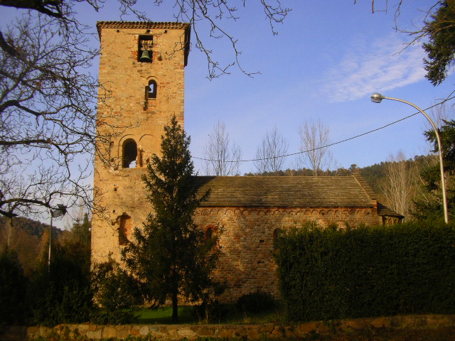 Església de Sant Sadurní d'Osormort